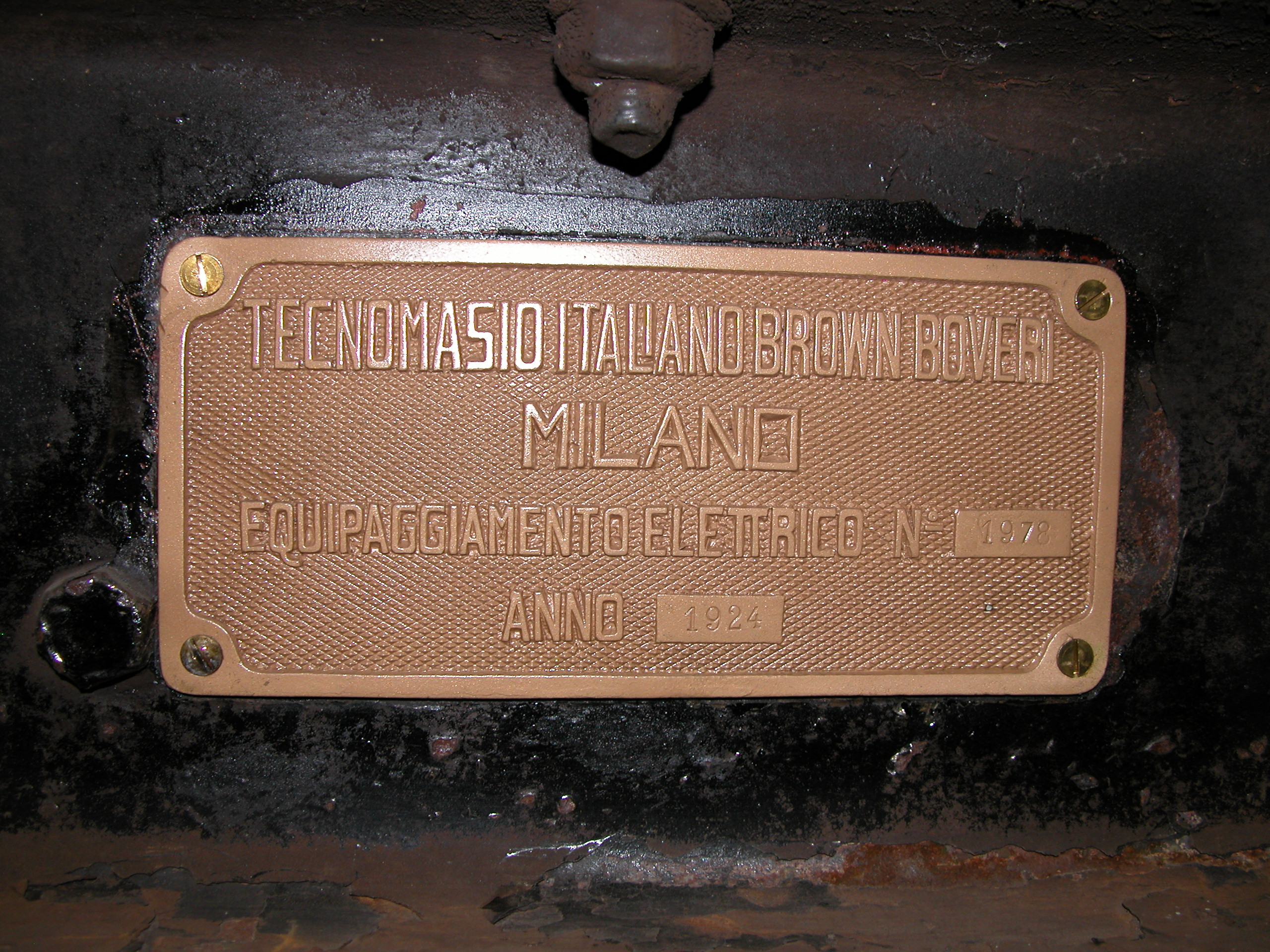 La targa del Tecnomasio Italiano Brown Boveri, con il numero di serie dell'equipaggiamento elettrico (nº 1978) e l'anno di costruzione (1924).